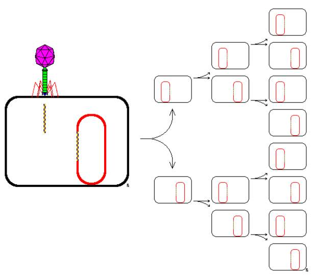 Het geïnjecteerde faaggenoom wordt als een profaag in het bacteriechromosoom gebracht. Als de bacterie zich deelt, deelt de profaag zich mee. zelf gemaakt